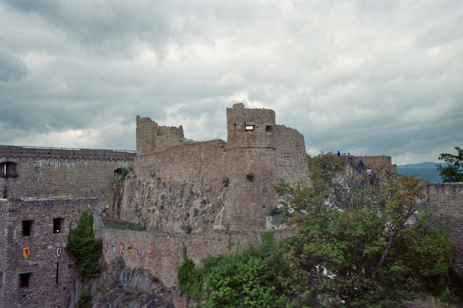 Château du Hohlandsbourg, près de Wintzenheim et Colmar, Haut-Rhin (68), France. (Photographie prise par Dsch67 en 2006)